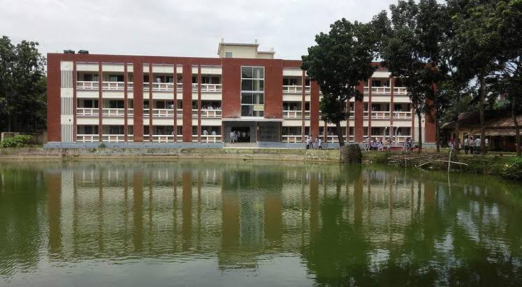 চৌদ্দগ্রাম সরকারি কলেজ